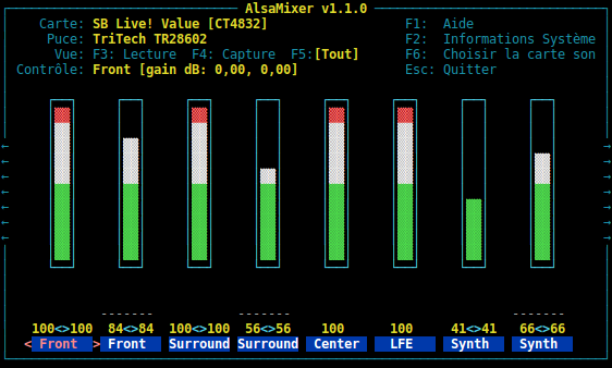 alsamixer v1.1.0 screenshot (Terminal, Xubuntu 17.04)